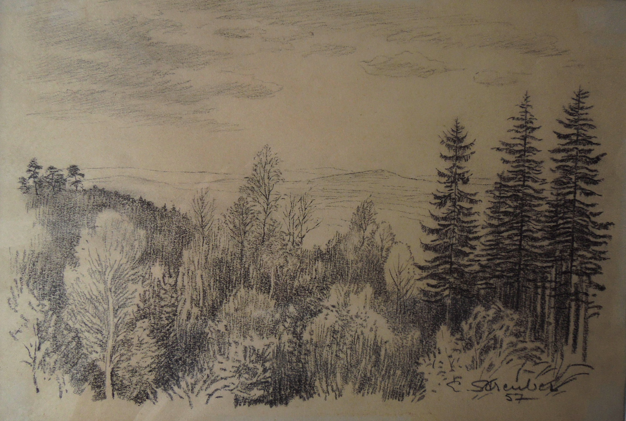 Bleistiftzeichnung auf Zeichenpapier 21 cm x 29,7 cm "Blick ins Harzvorland oder zum Brocken" 1957